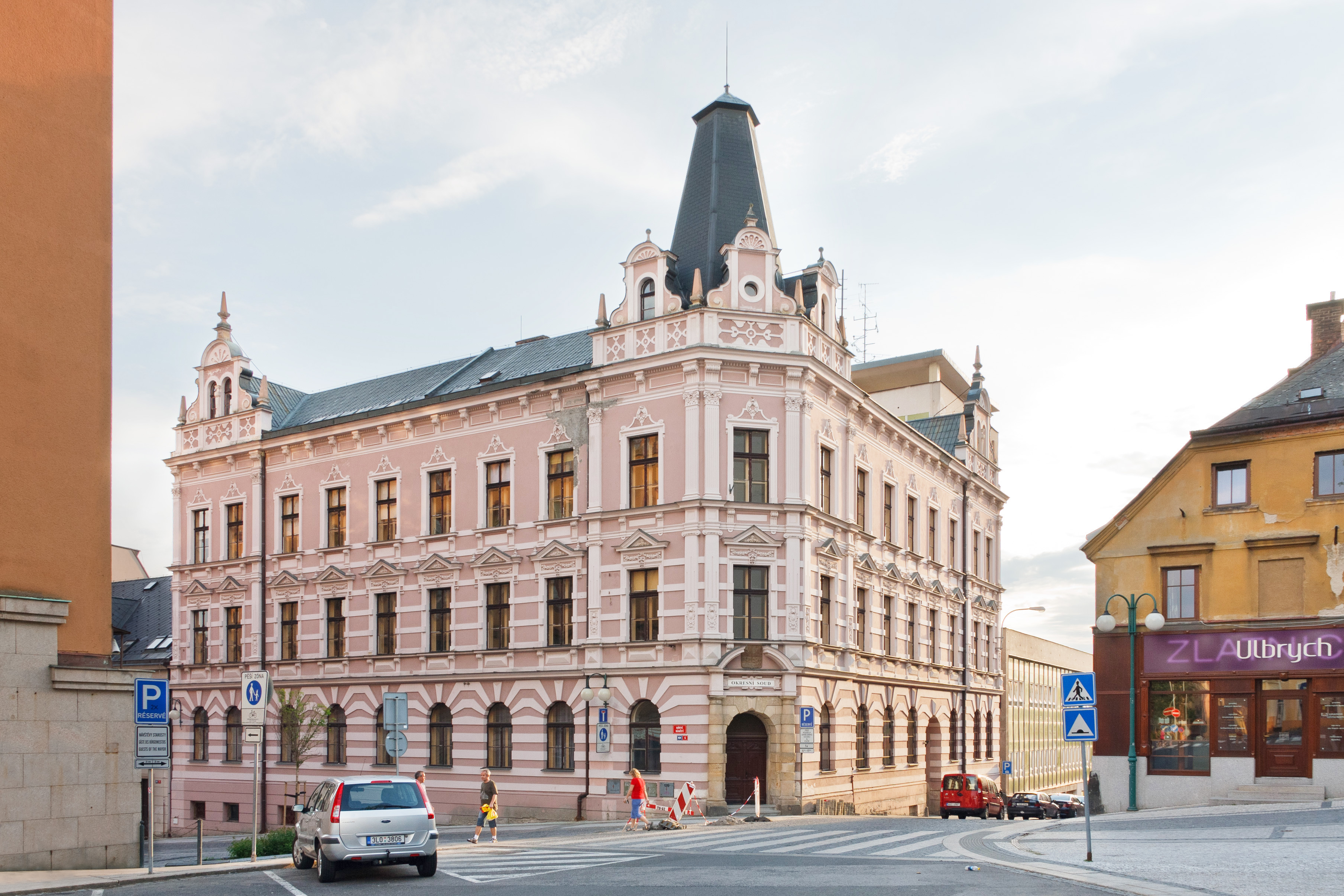 Budova Okresního soudu v Jablonci nad Nisou